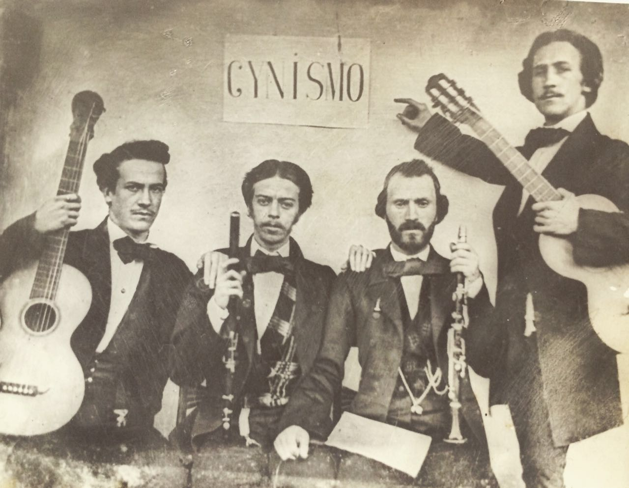 O clarinetista e comerciante Henri-Louis Levy é o segundo da direita para a esquerda.